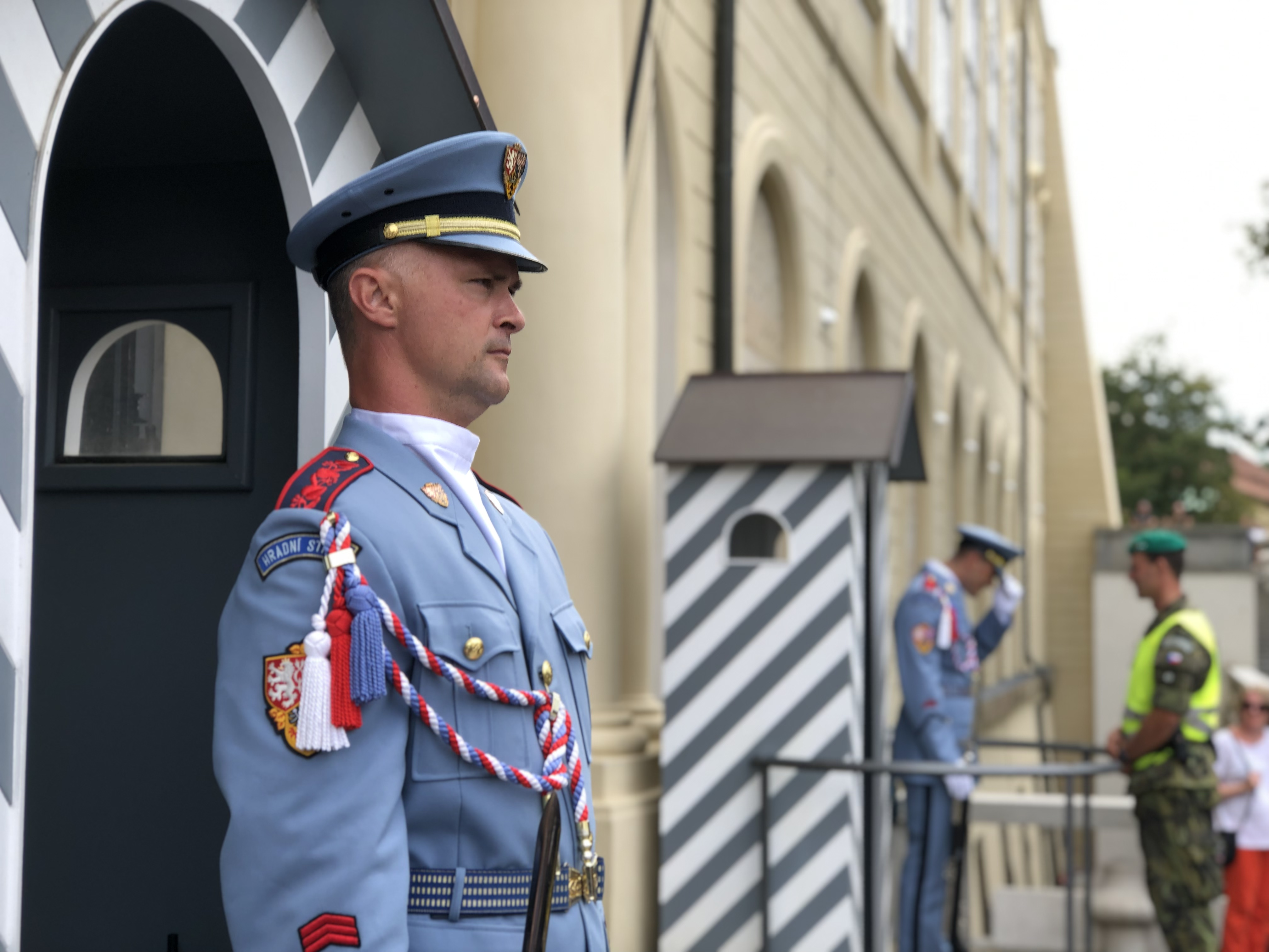 Praagse Burcht, Praag, Tsjechië, August 2019